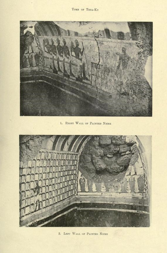 Grab Teta-Ky (XVIII. Dynastie). Ausgrabung Carter und Carnarvon 1908 im Tal Der el Bahari